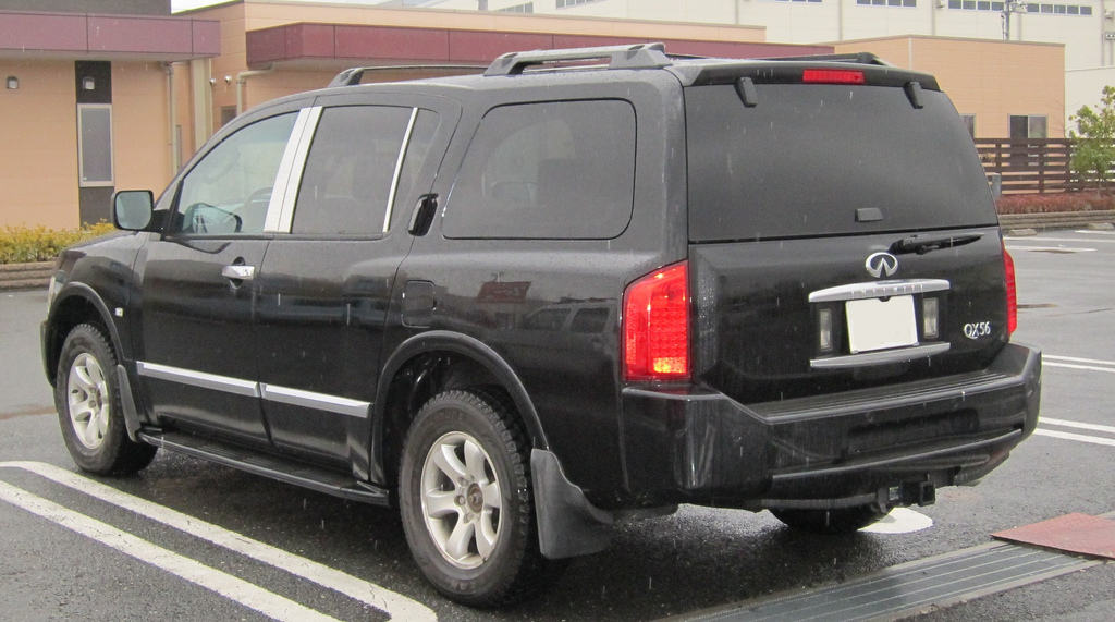 Infiniti QX56 in Japan.